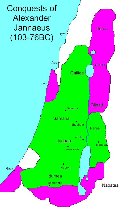 Categorie:Kaart Categorie:Afbeelding oudheid (Original text: Judea onder Alexander Janneüs)